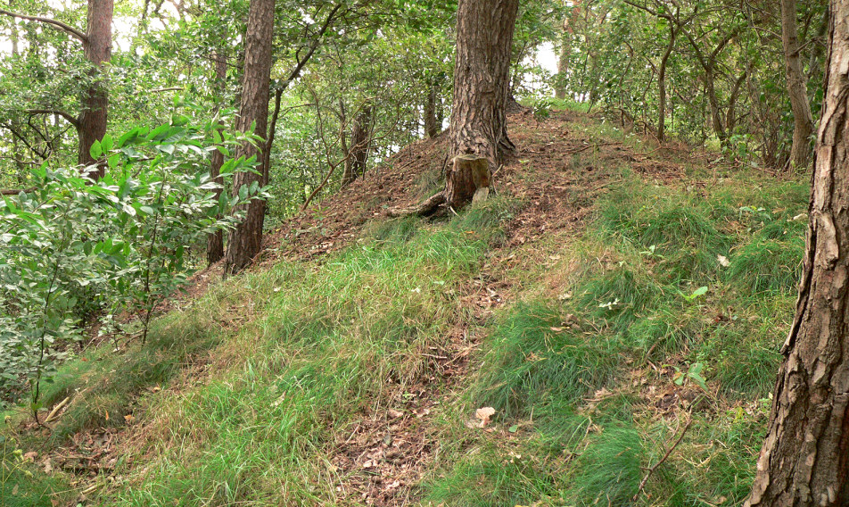 Wallkrone der Düsselburg